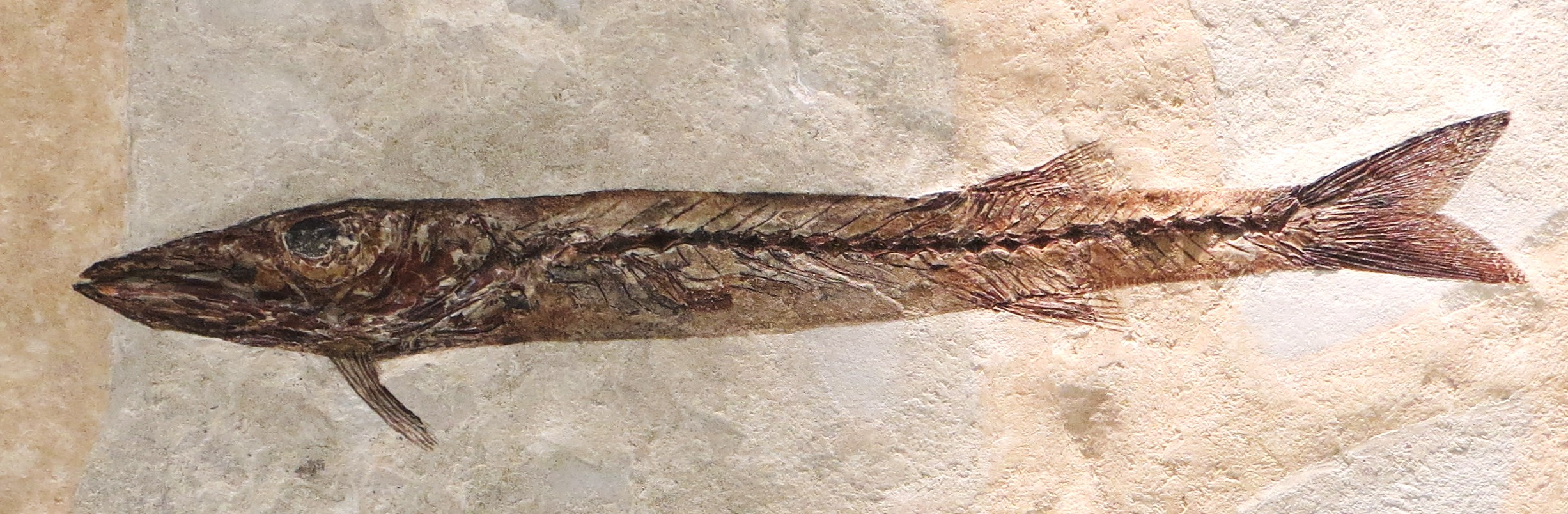 Fossil of Sphyraena, an extinct fish- Took the picture at Museo di Arsago Seprio